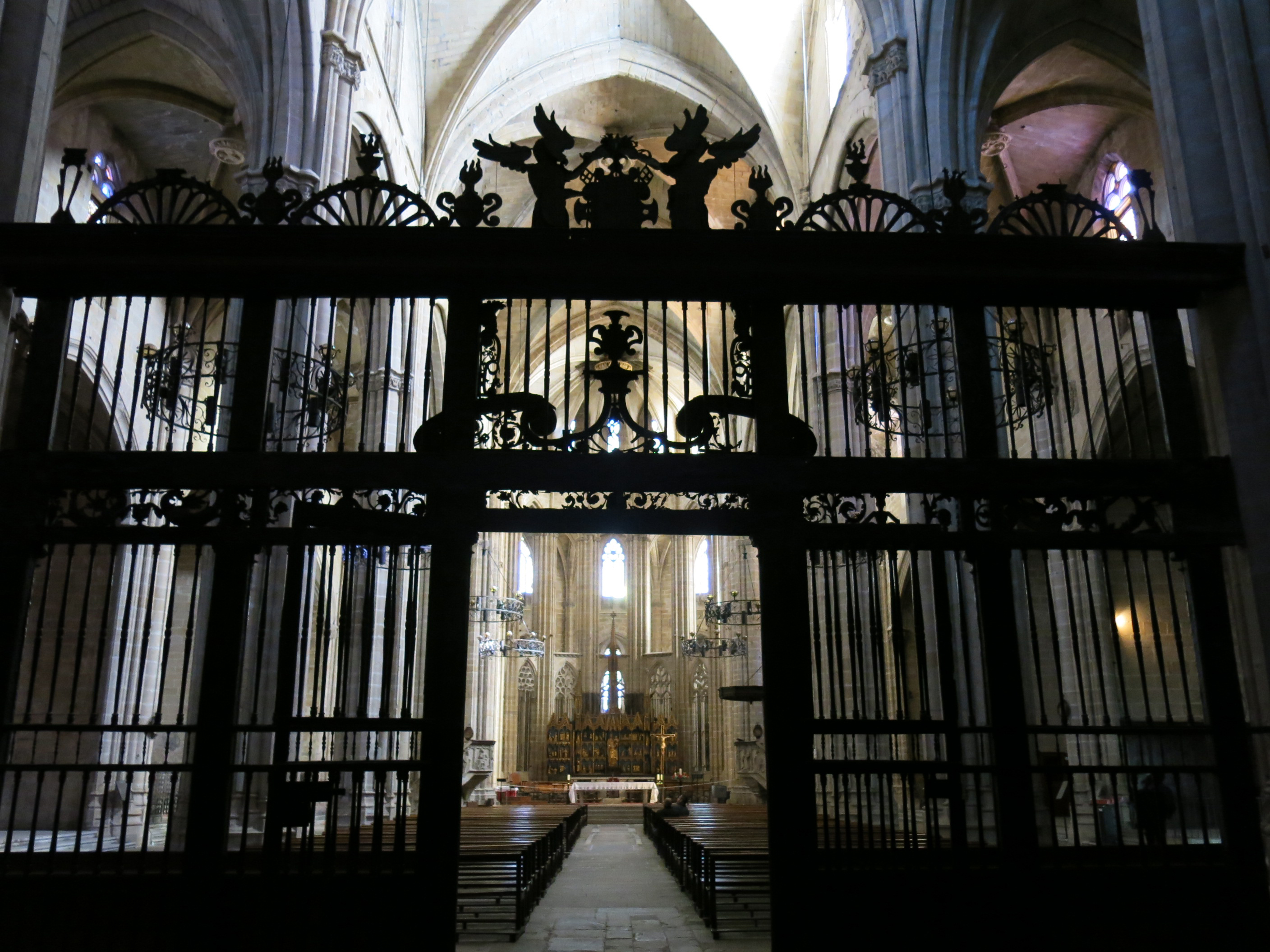 Catedral de Santa Maria (Tortosa)